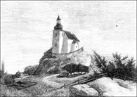 Kosciól w Gołonogu. Drzeworyt sztorcowy pochodzacy z „Tygodnika Ilustrowanego” z 1862 roku.